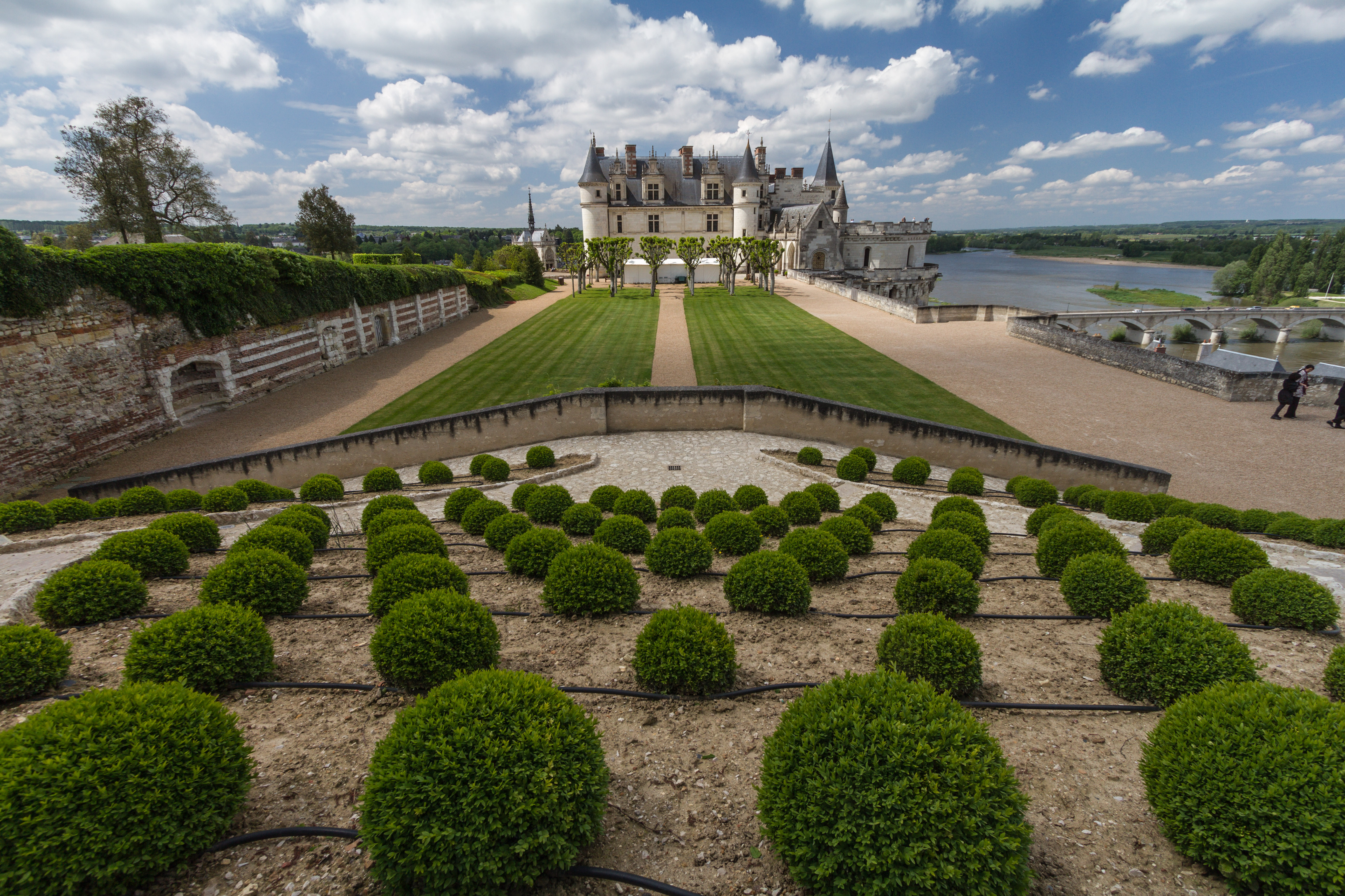 Amboise, Schlossgarten